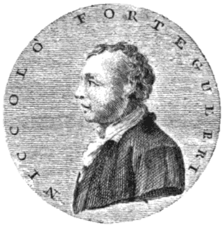 Niccolò Forteguerri